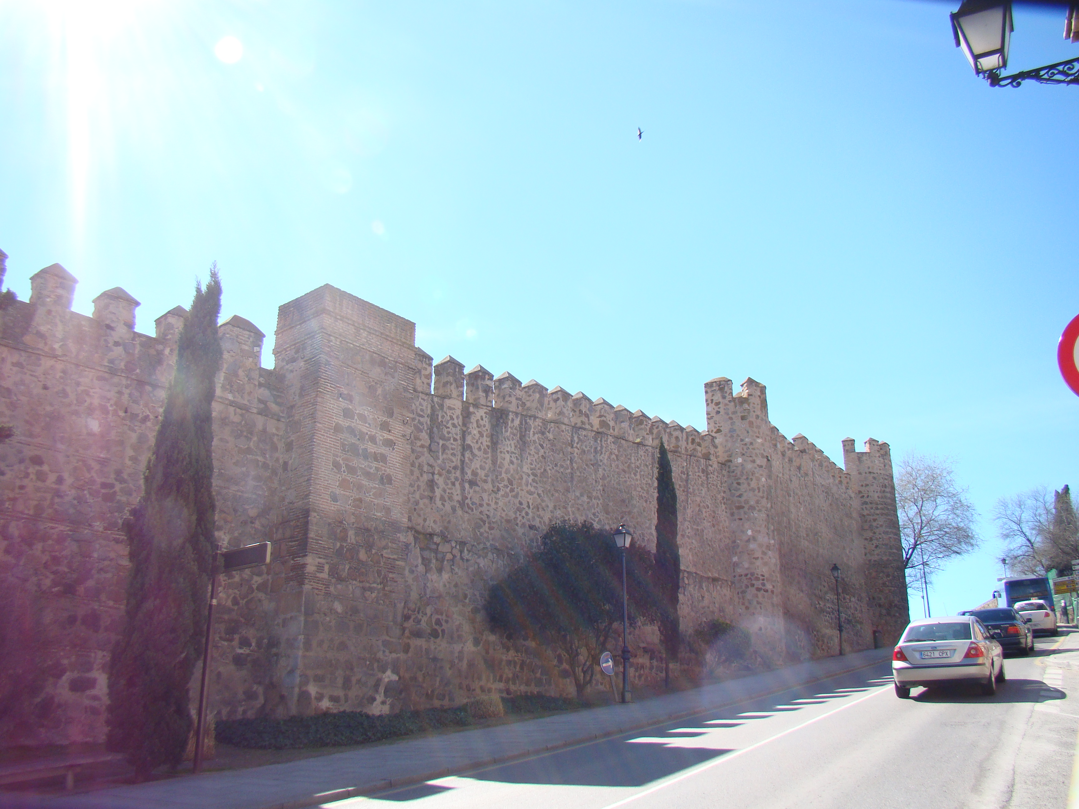 Recinto de la Reconquista de Puerta Nueva de Bisagra a Ermita de Los Desamparados